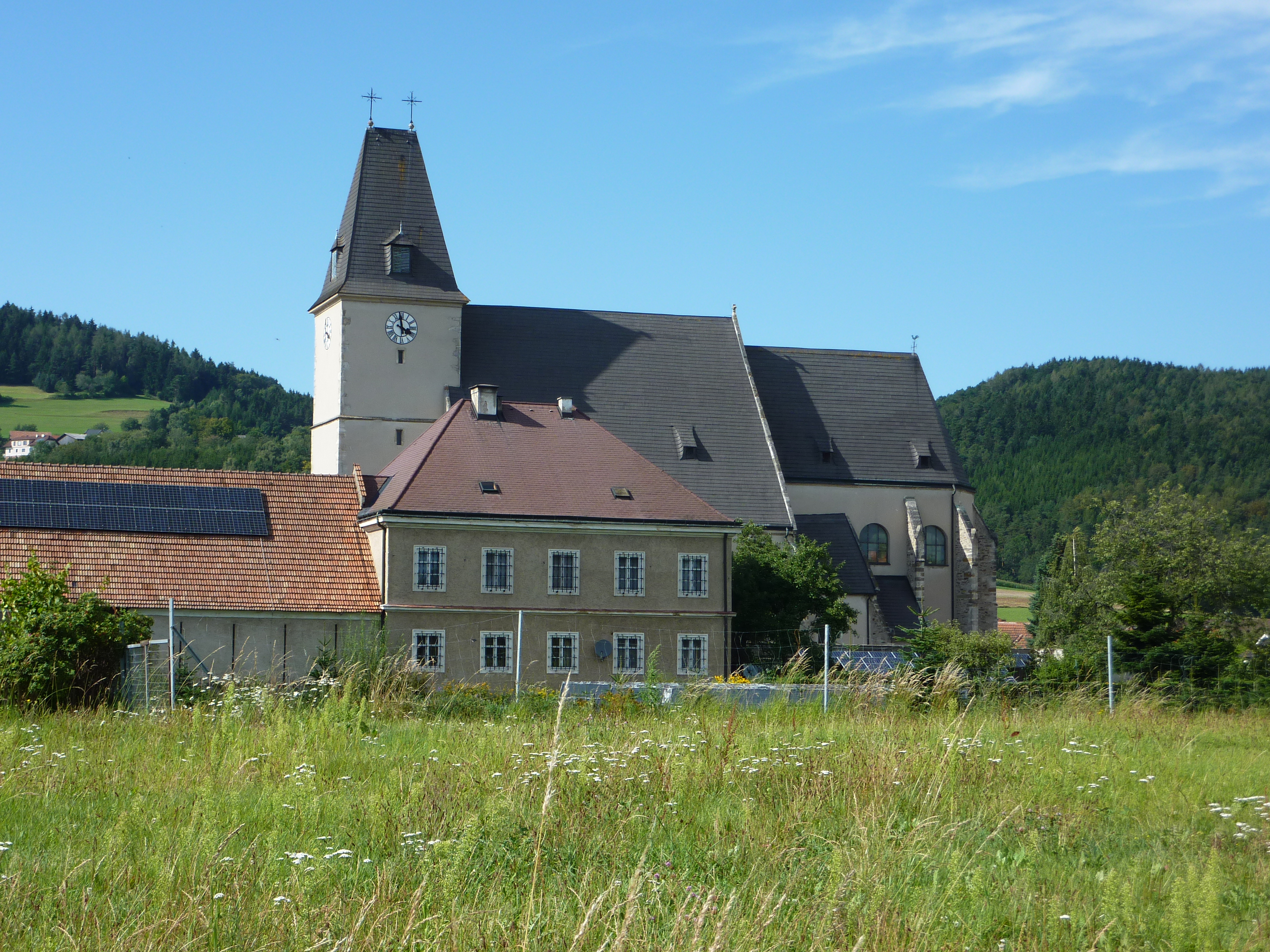 Wallfahrtskirche Maria Laach am Jauerling in Niederösterreich - Südseite; im Vordergrund der Pfarrhof